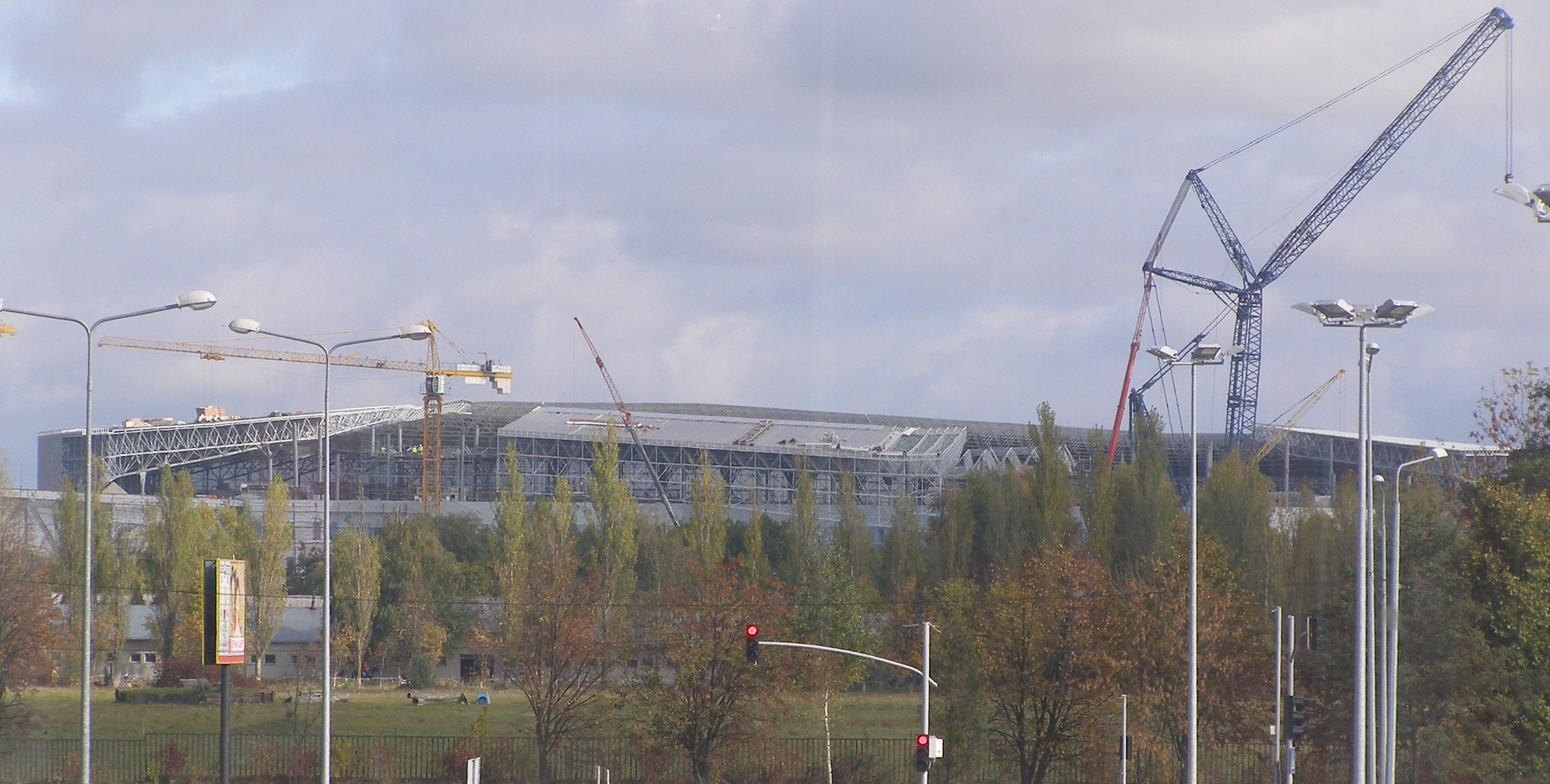 Новий стадіон у Львові. Жовтень 2011. Вигляд з вулиці Стрийської